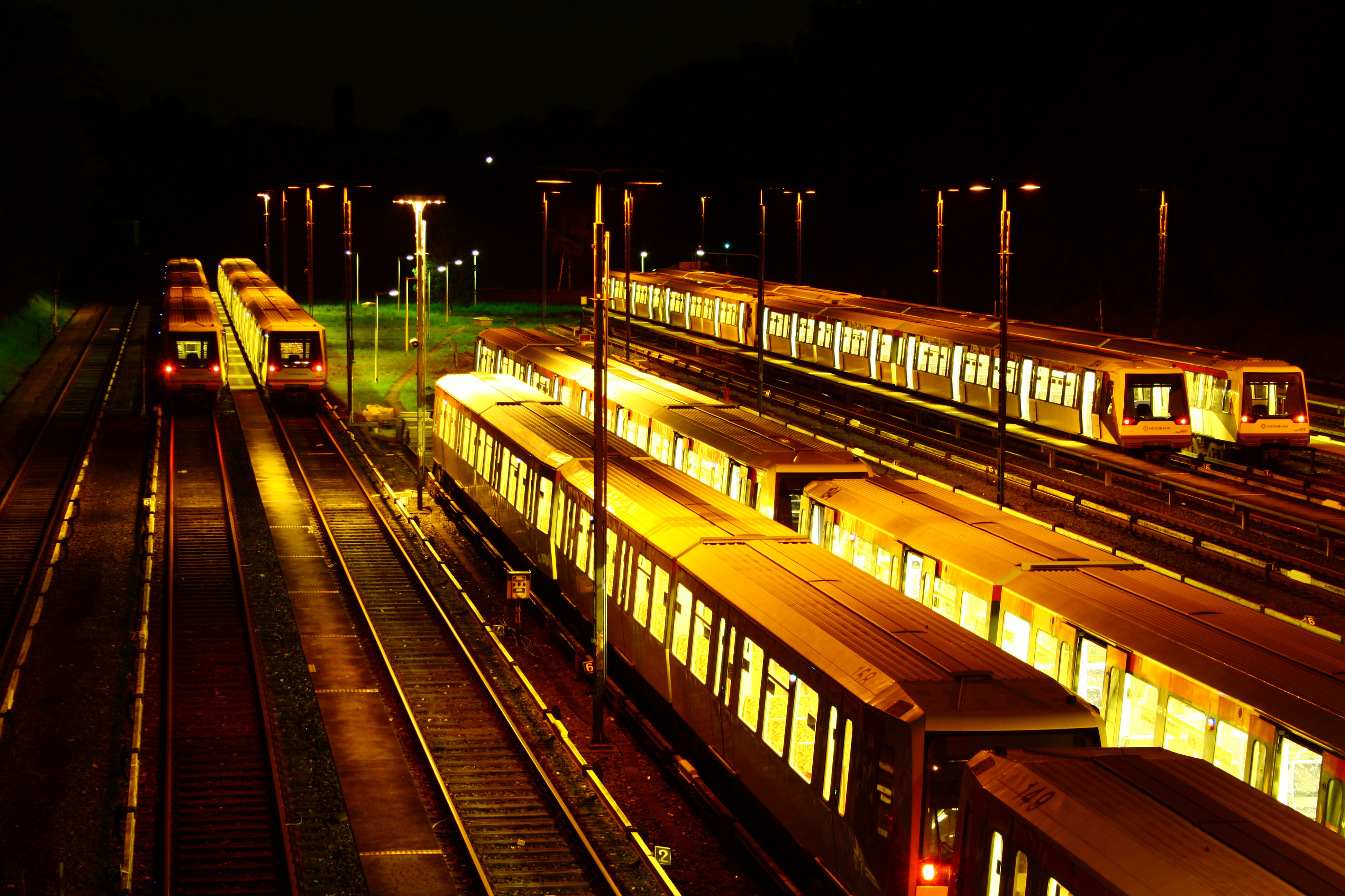 U-Bahnabstellanlage Schiffbeker Weg zwischen U-Legienstraße und U-Billstedt. Fahrzeuge von Typ DT4 der Hamburger Hochbahn